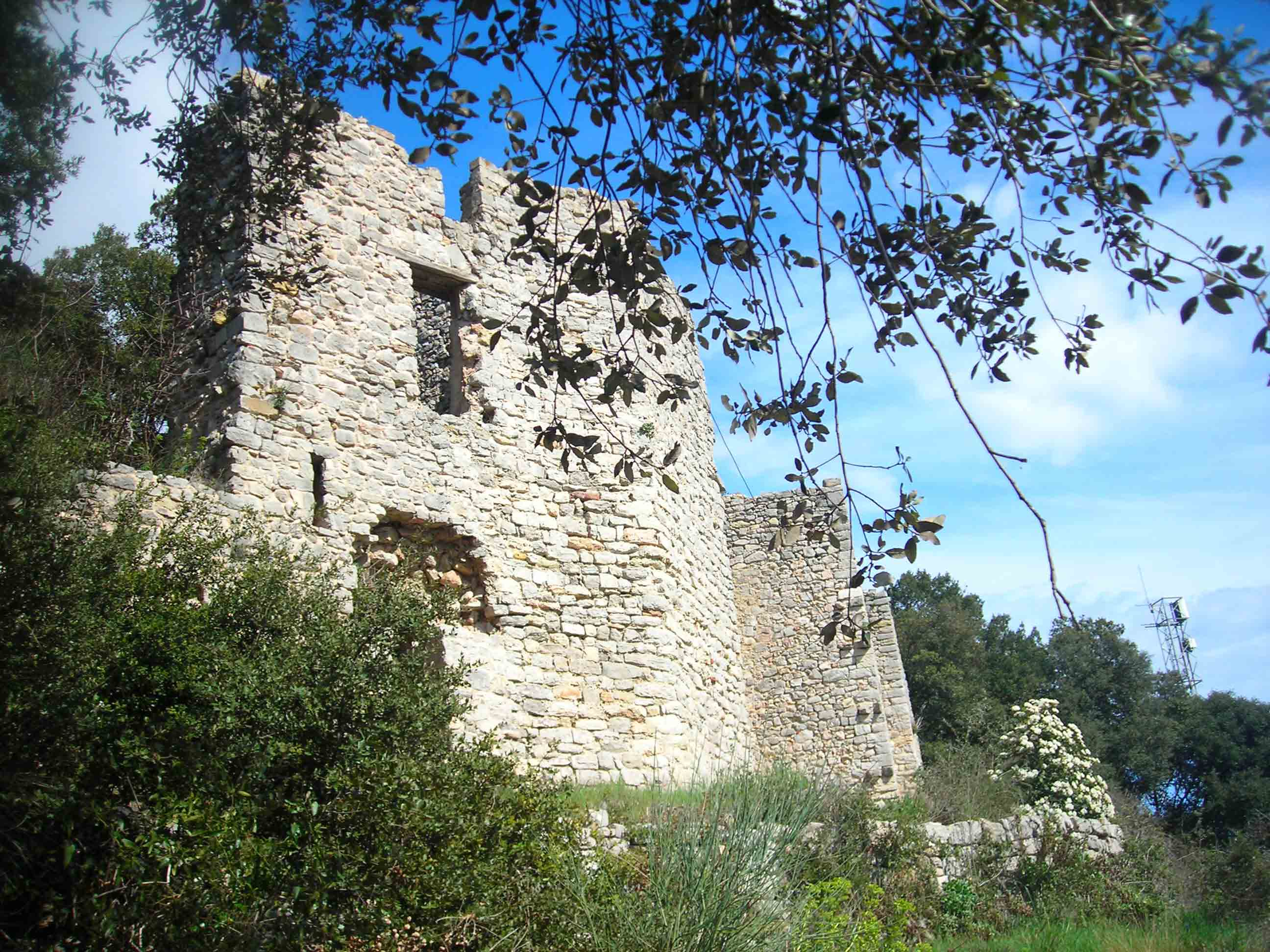 photographie prise par jean paul barbero (Utilisateur:Cubito) le 10/03/2007